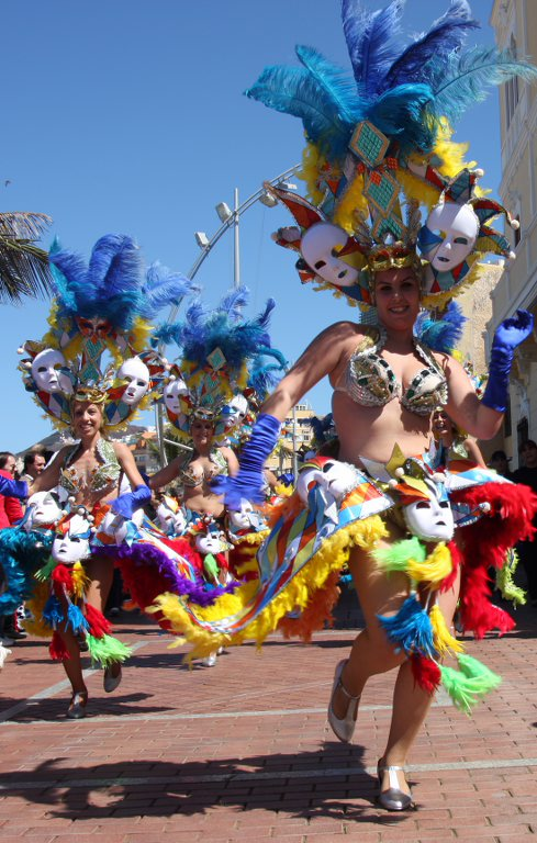 Pasacalles "Carnaval al Sol" desfilandopor la avenida de la Playa de Las Canteras en el Carnaval de Las Palmas de Gran Canaria de 2011.